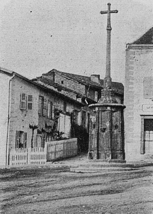 Dictionnaire illustré des communes du département du Rhône. Tome 1 / par MM. E. de Rolland et D. Clouzet.